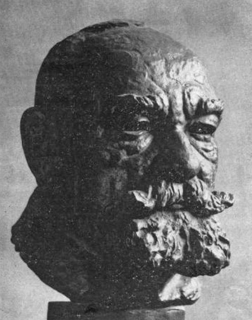 Büste des Leipziger Schriftstellers A. Kutschbach.